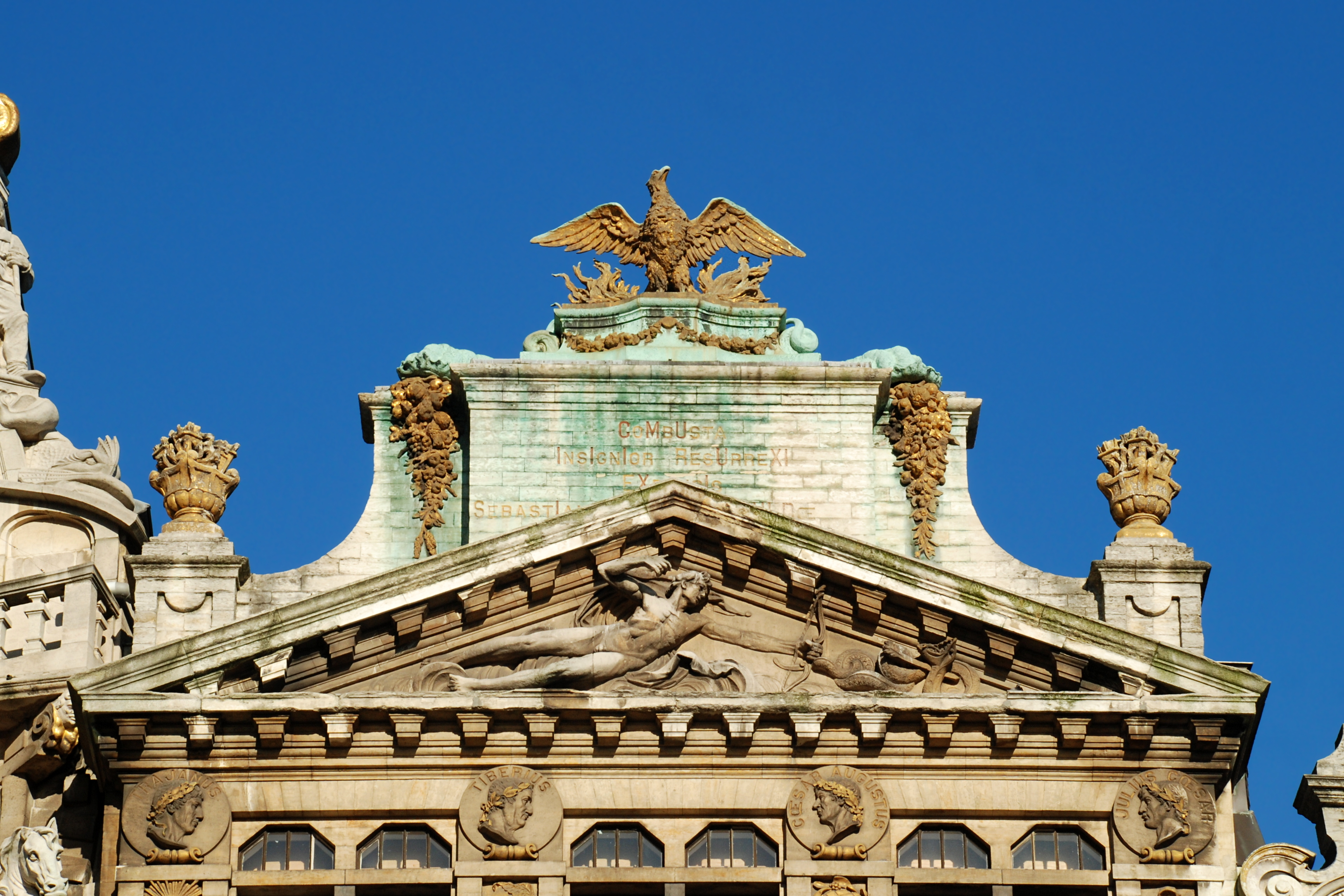 Belgique - Bruxelles - Grand-Place - Maison de la Louve